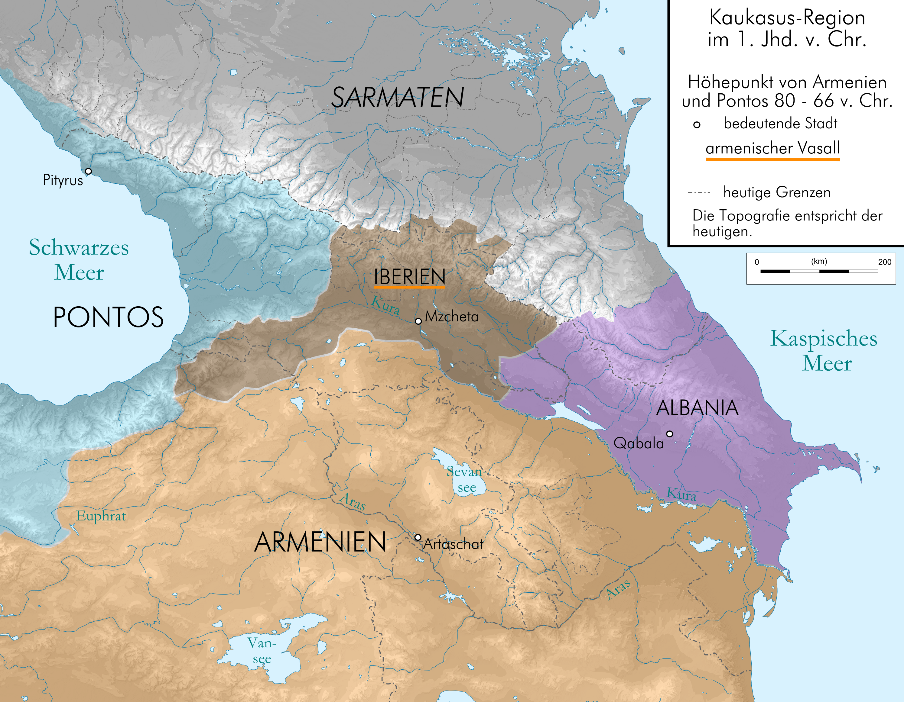 Kaukasus-Region um 80 v. Chr. Quellen sind File:Geor_earliest_2A.jpg , Putzger historischer Weltatlas Ausgabe 2005, , Heinz Fähnrich: Geschichte Georgiens von den Anfängen bis zur Mongolenherrschaft. Shaker, Aachen 1993, ISBN 3-86111-683-9.